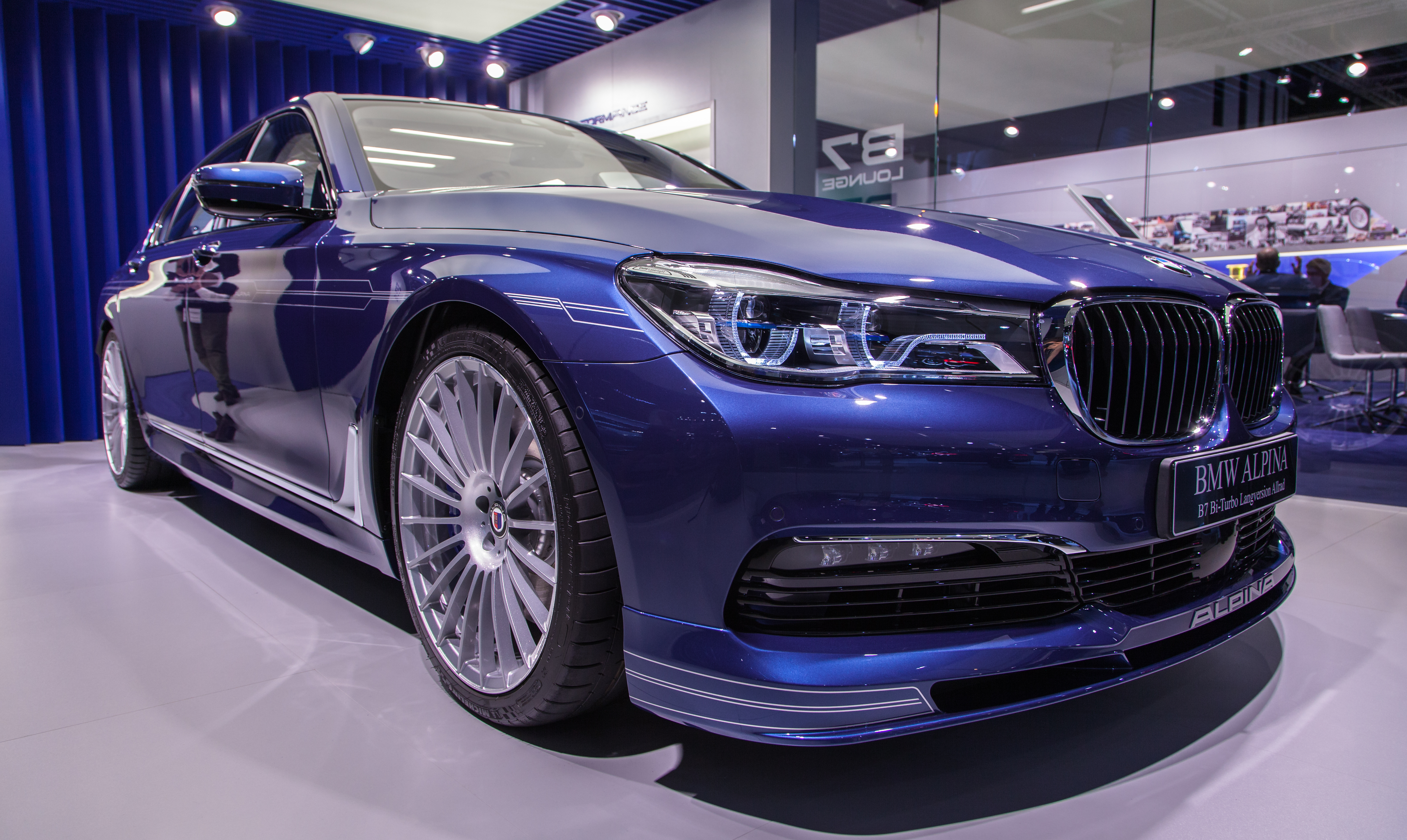 Alpina B7 Bi-Turbo Langversion